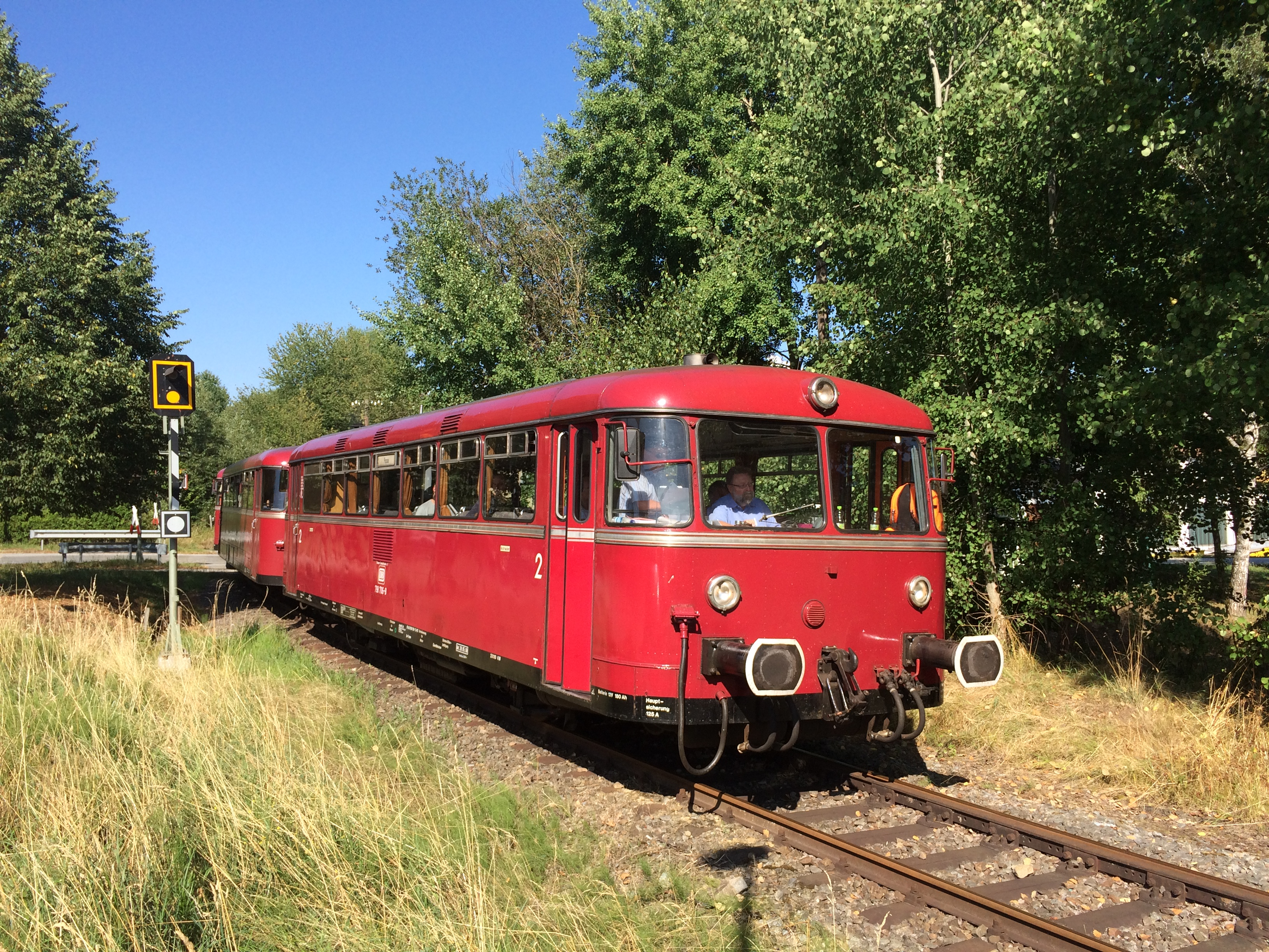 Schienenbusse der Passauer Eisenbahnfreunde auf der Ilztalbahn zwischen dem Bahnübergang Bahnhofstraße /Osterbachtal und dem Bahnhof Röhrnbach